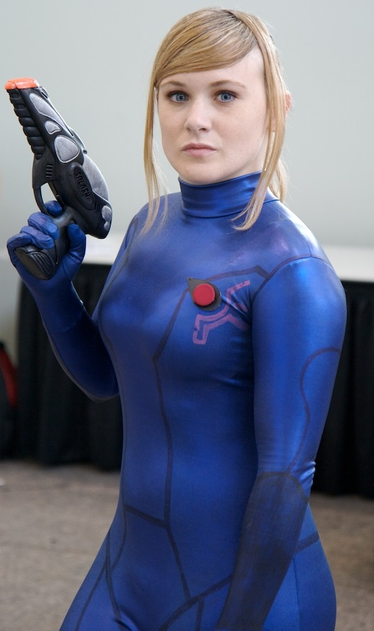 Zero Suit Samus cosplay